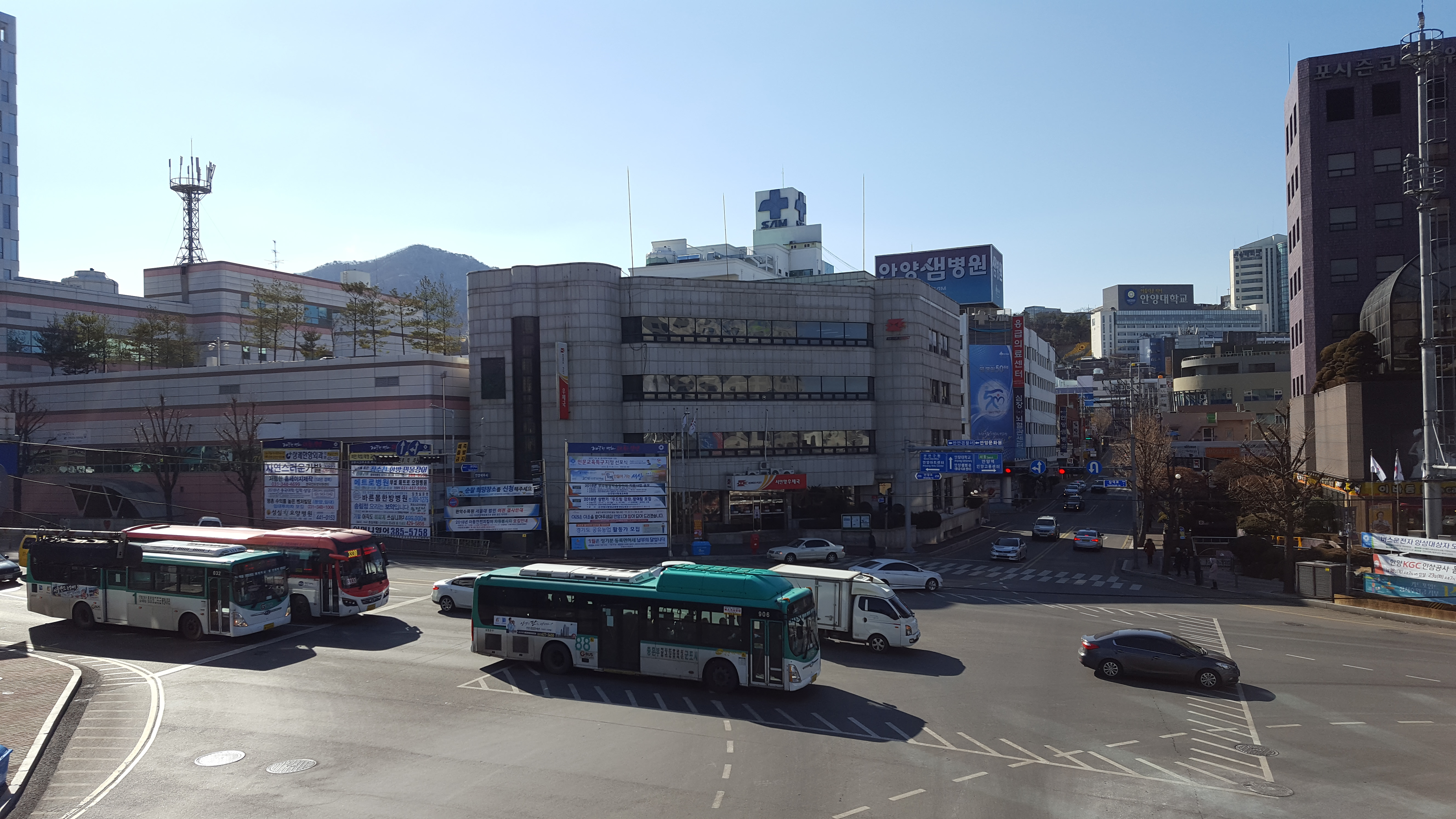 서안양우체국